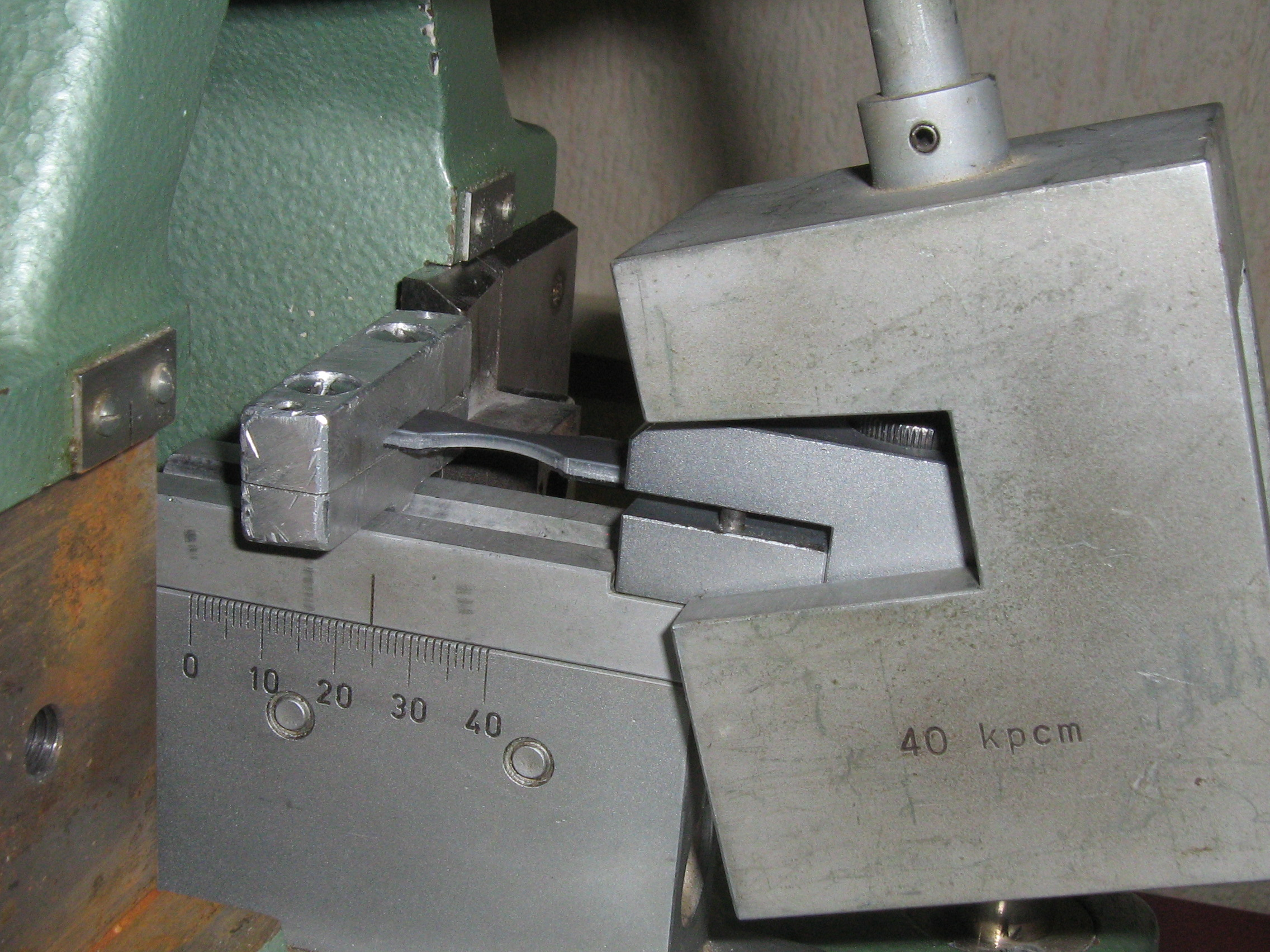 Probenhalterung und Schlagpendel für Schlagzugprüfung